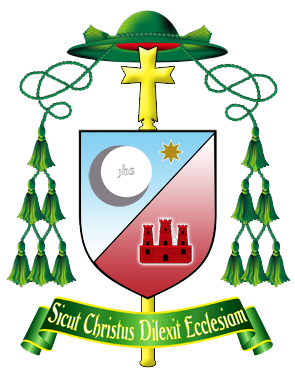 Stemma Episcopale di S. E. Mons. Giuseppe Giudice